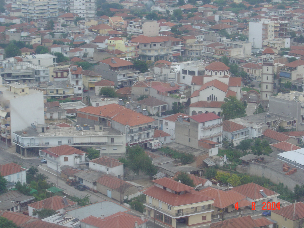 Панорама към Каламбаки.